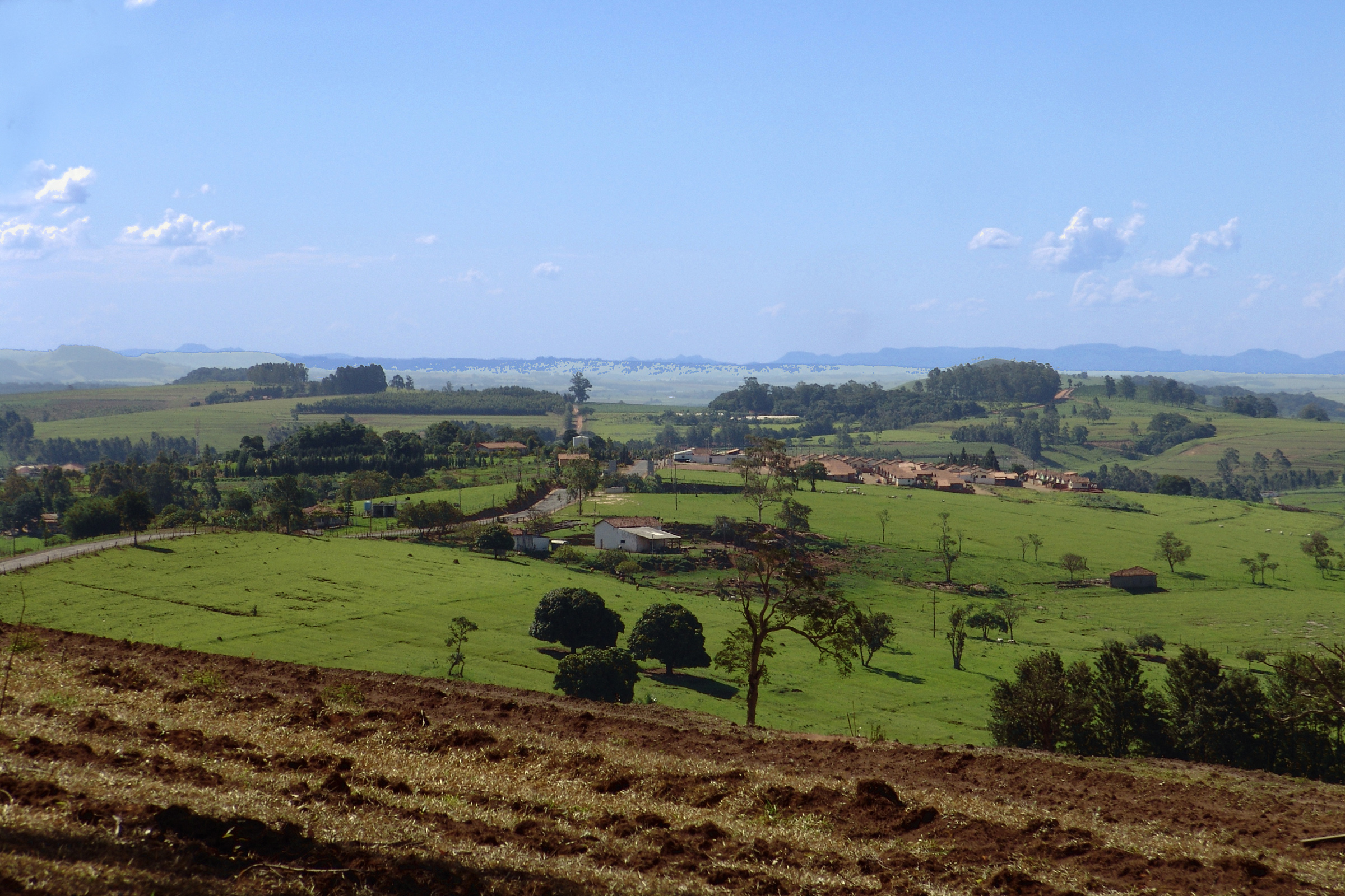 Município de Coronel Macedo, São Paulo, Brasil